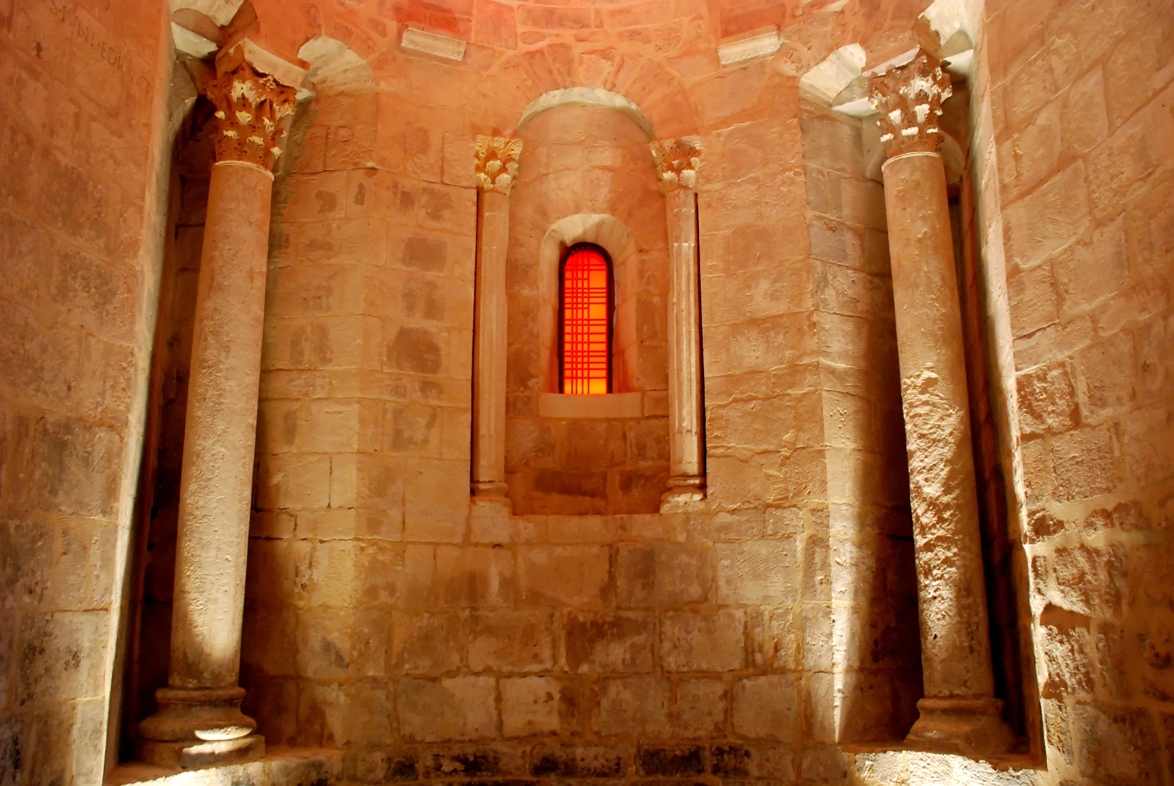 France - Provence - Prieuré Notre-Dame de Salagon